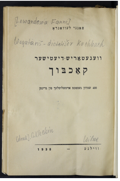 Fanni Lewando Vegetarish-dietisher kokhbukh : 400 shpayzn gemakht oysshlislekh fun grins, Vilnius 1938